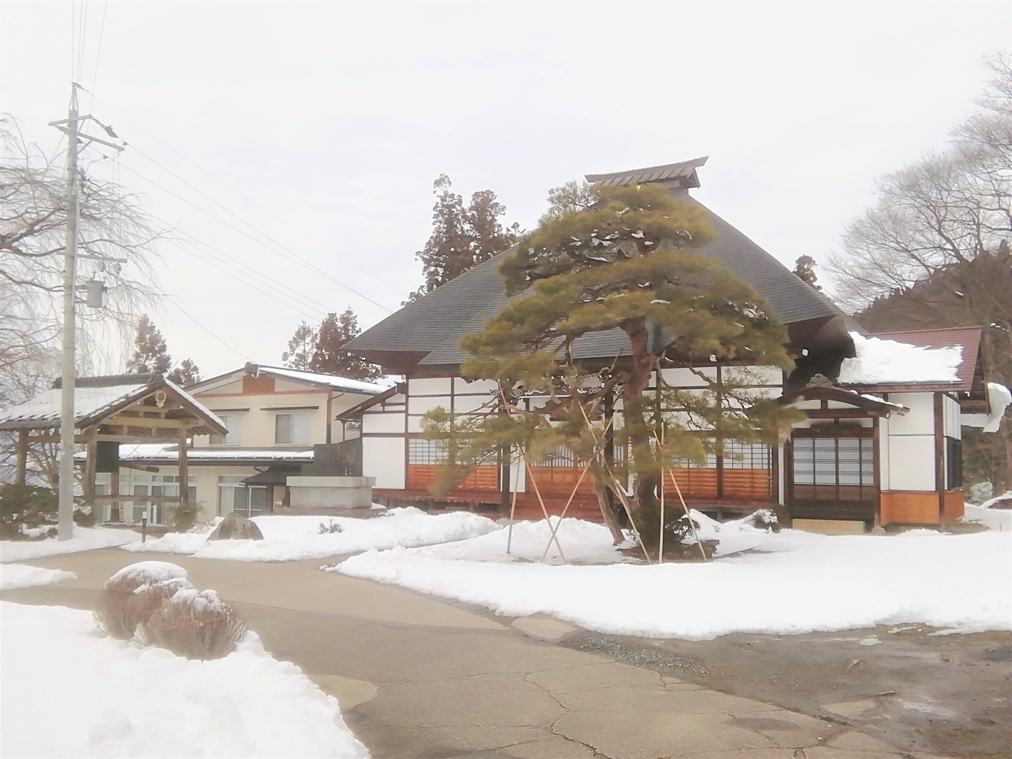 如法寺(中野市）2020-2-12